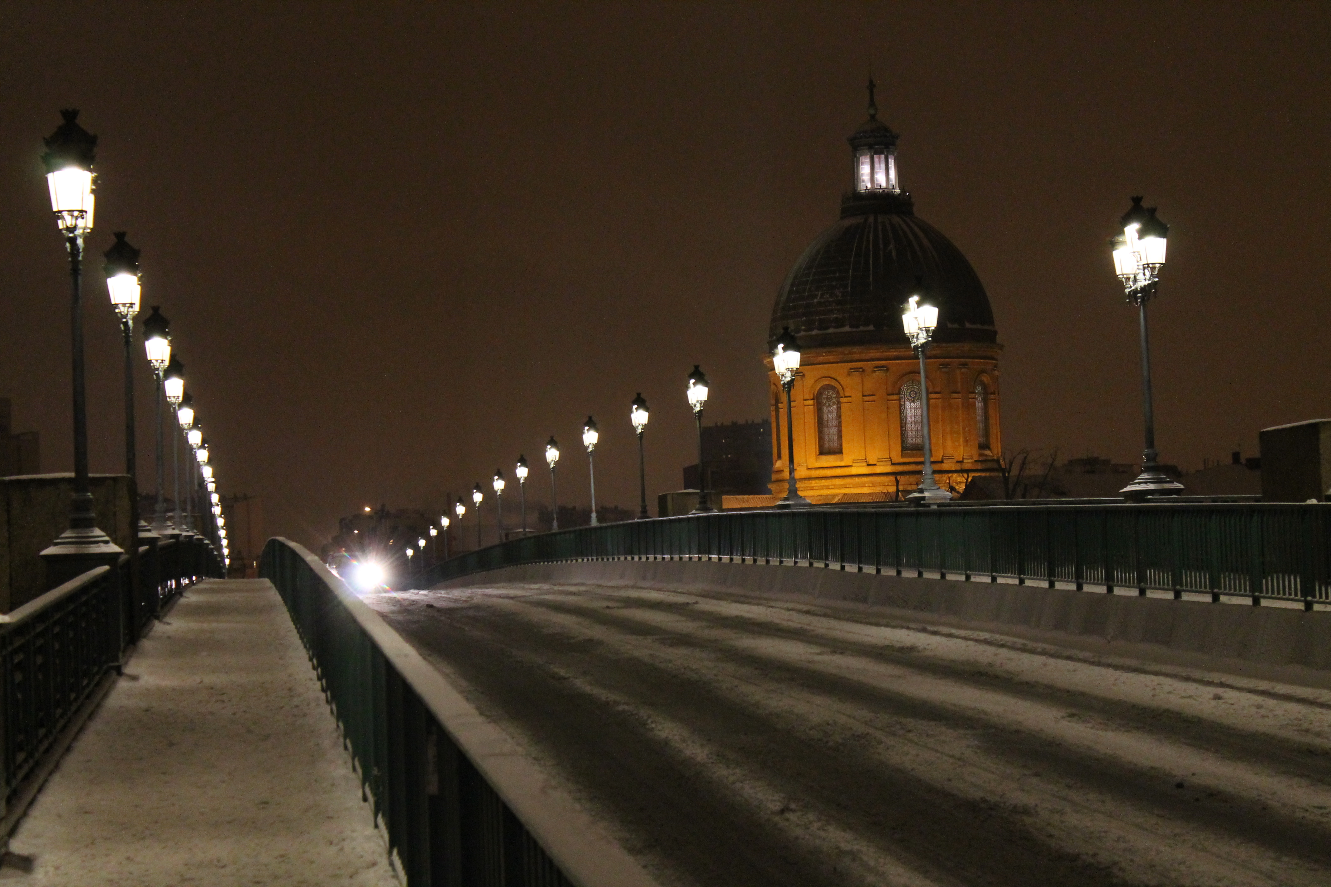 Le dôme de la Grave enneigé avec le Pont Saint-Pierre, Toulouse, février 2012.